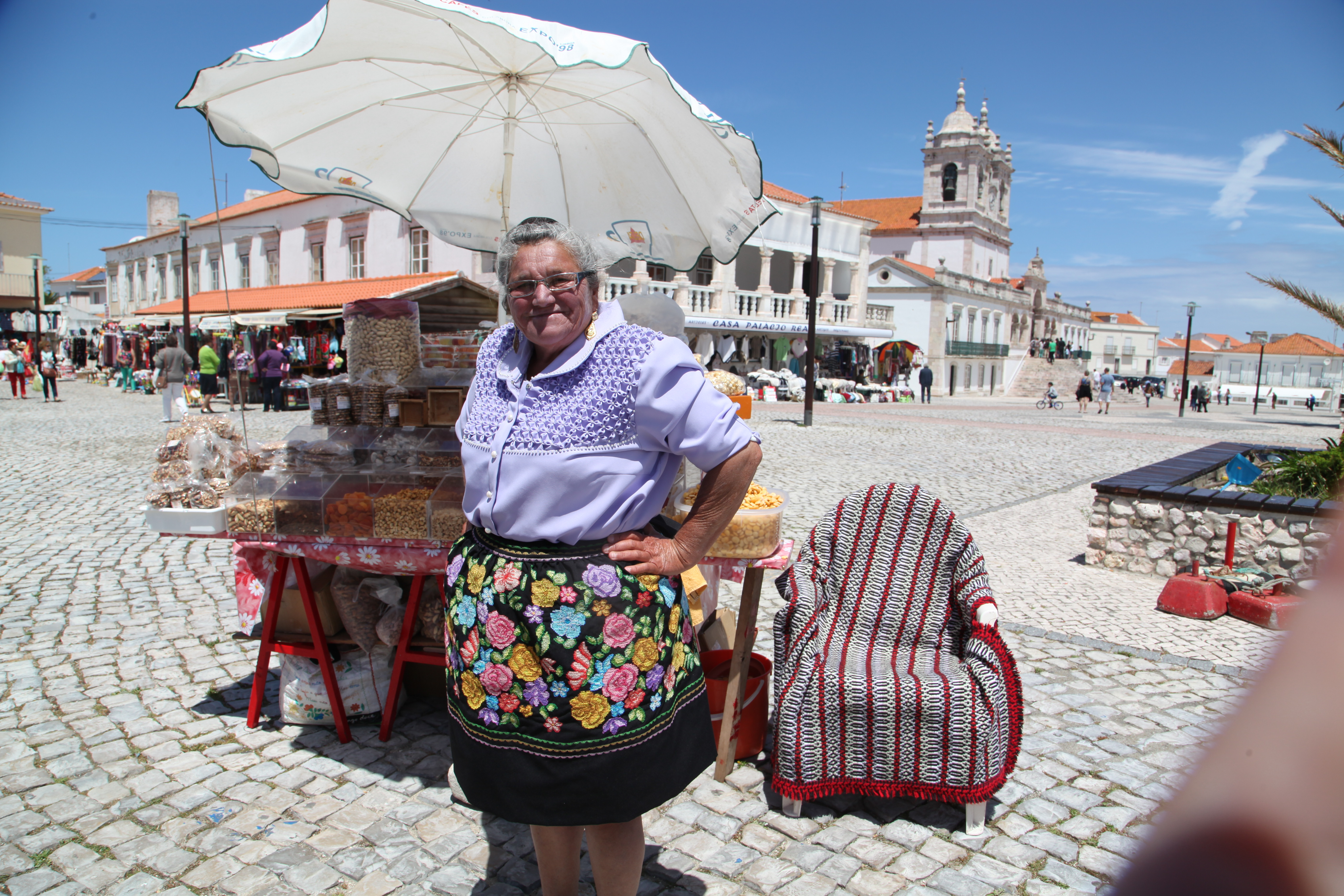 Portugal - de Nazaré à Fatima